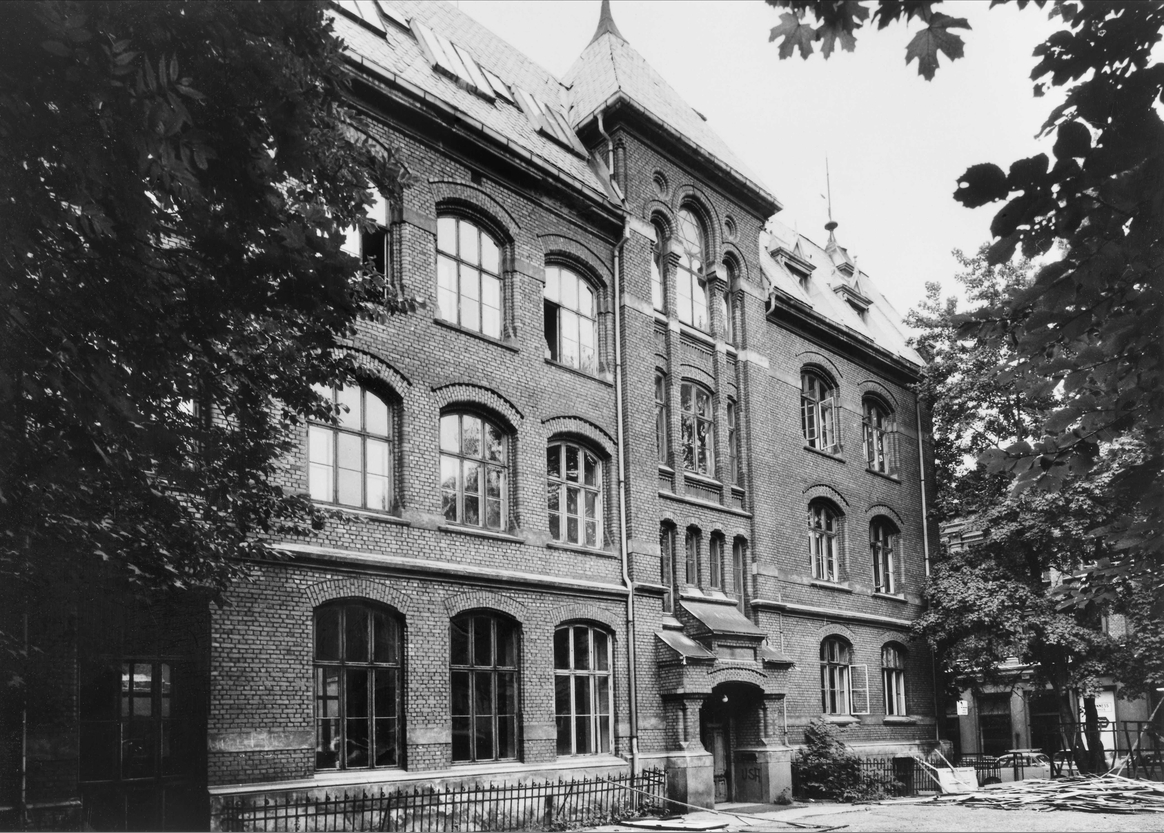 Halling skole i Oscars gate 30 fotografert av Knut Eng i 1969, samme år som den ble revet. Fra Byhistorisk samling hos Oslo Museum.